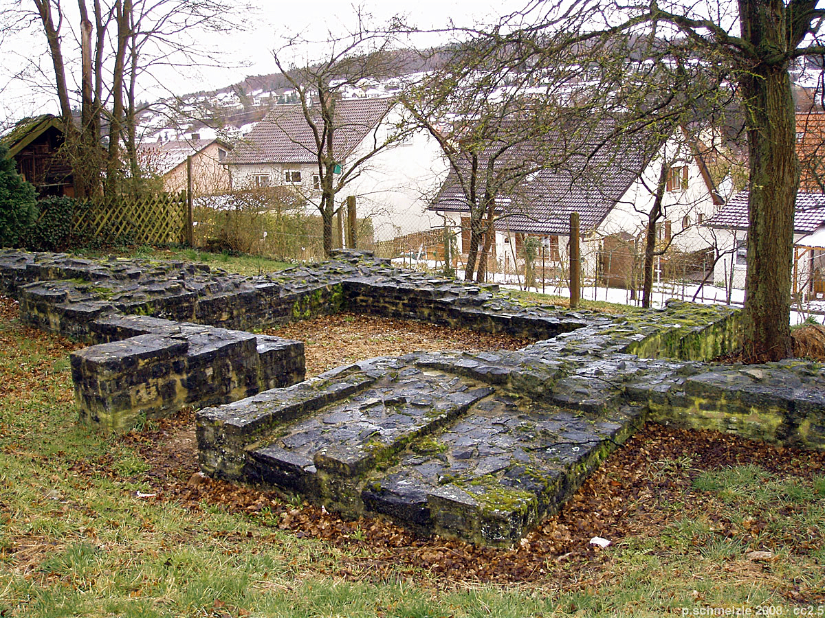 Fundamentrest vom Römerkastell in Osterburken